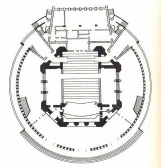 Брэст. План кінатэатра Беларусь